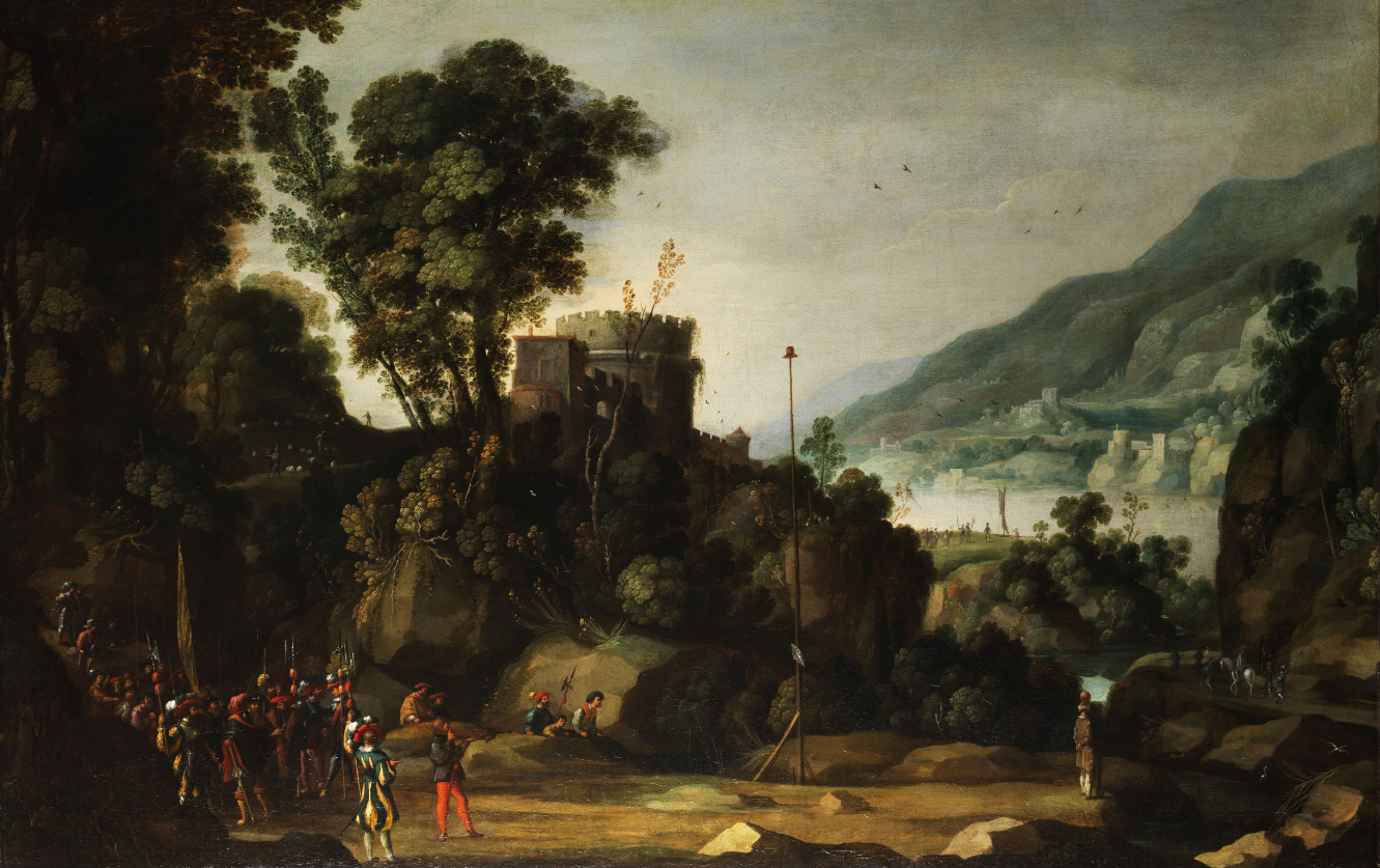 Fantasielandschaft mit Darstellung der Geschichte des Wilhelm Tell, Öl auf Leinwand, 94 x 156 cm